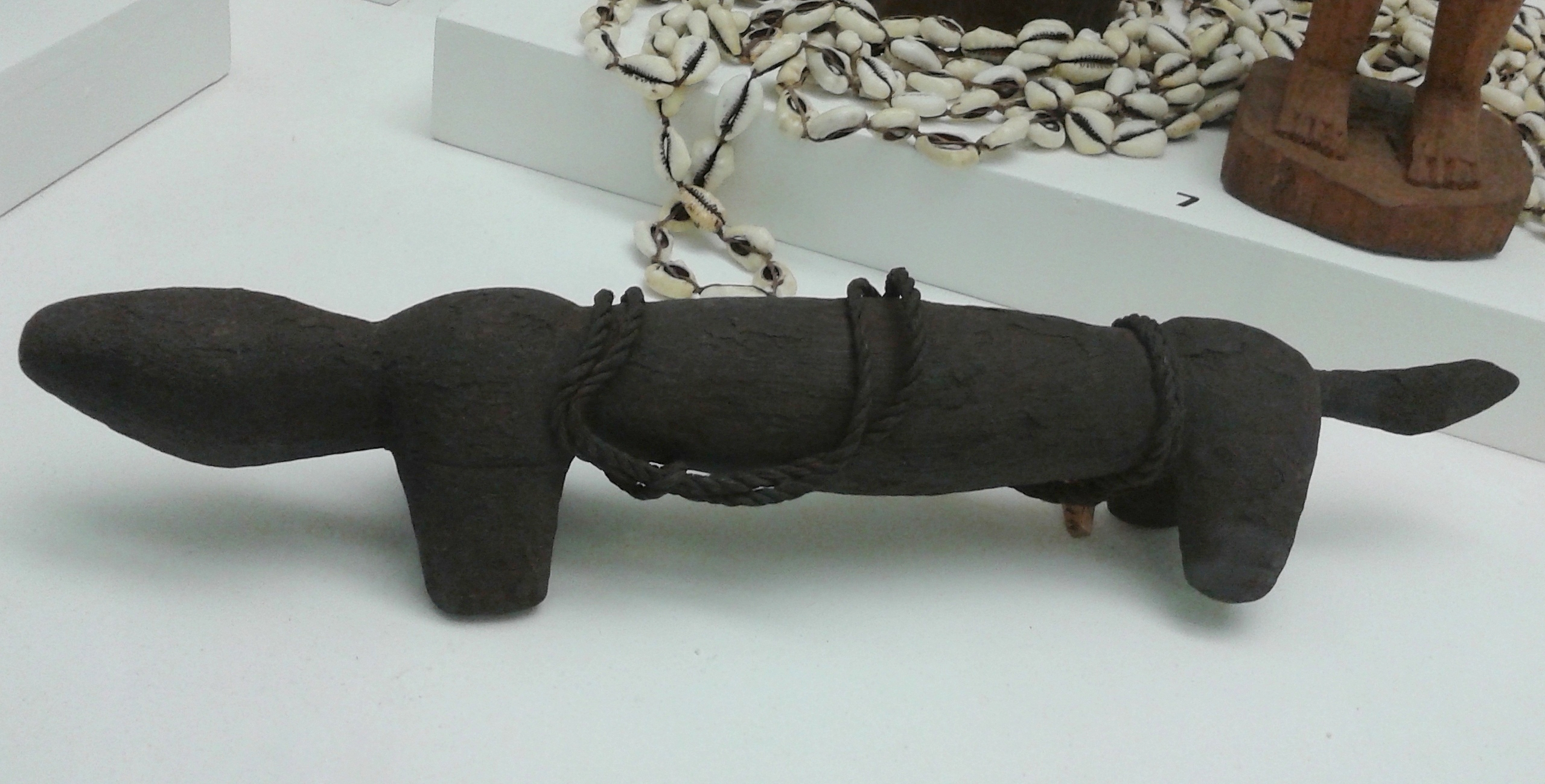 Espírito da natureza sob a forma de um animal usado como oráculo pelos Bafo. Acervo de etnologia africana e afro-brasileira do Museu Nacional/UFRJ - Rio de Janeiro, Brasil.